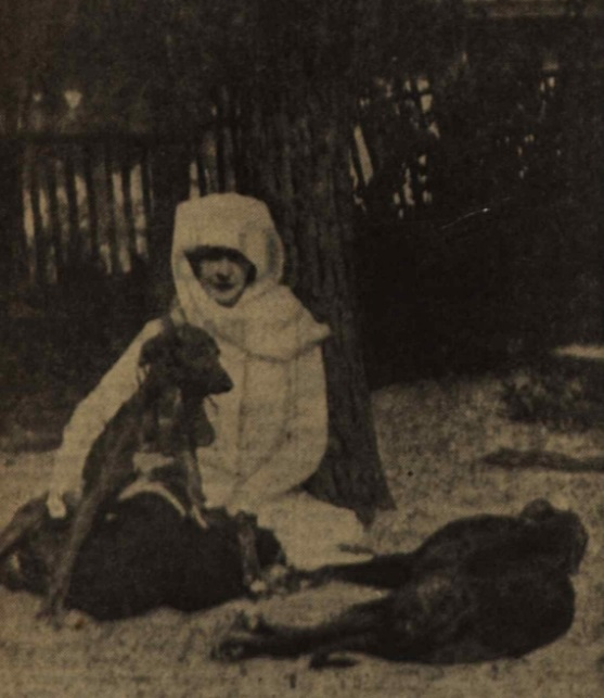 Nathalie de Goloubeff nel giardino di Arcachon con due levrieri (1908-1914). Fotografia scattata da Gabriele D'Annunzio.